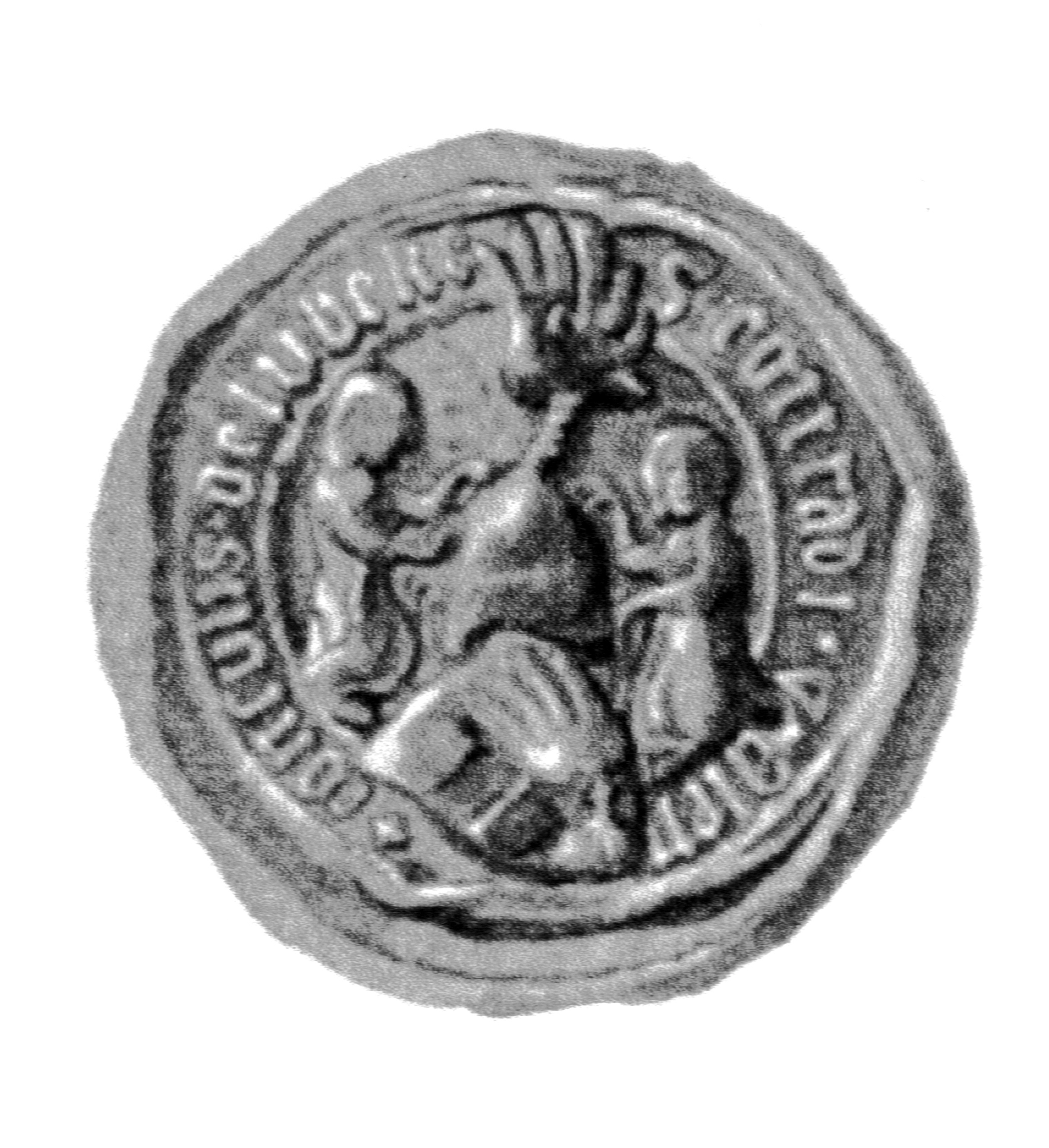 Siegel des Ratsmannes Curd von Ahlen. Das Siegel stammt aus der Zeit um 1408. Siehe Emil Ferdinand Fehling: Lübeckische Ratslinie, Nr. 422 (Konrad von Alen).